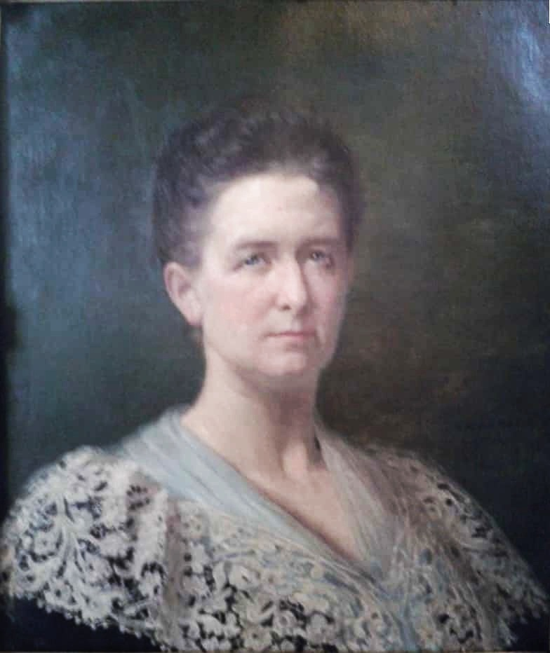 Portrait de madame de la Comtesse de Flandre